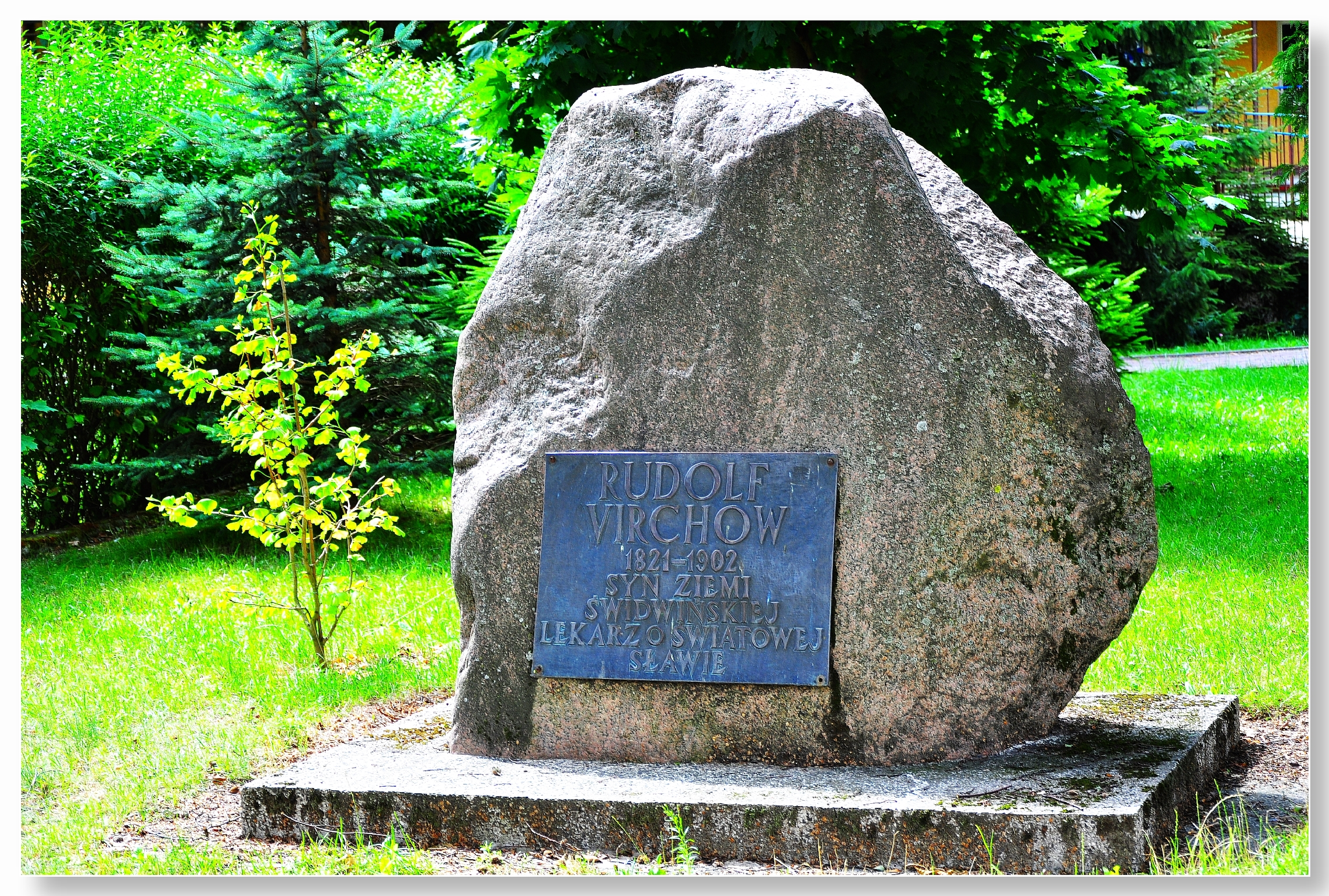 Świdwin - kamień pamiątkowy Rudolfa Virchowa.